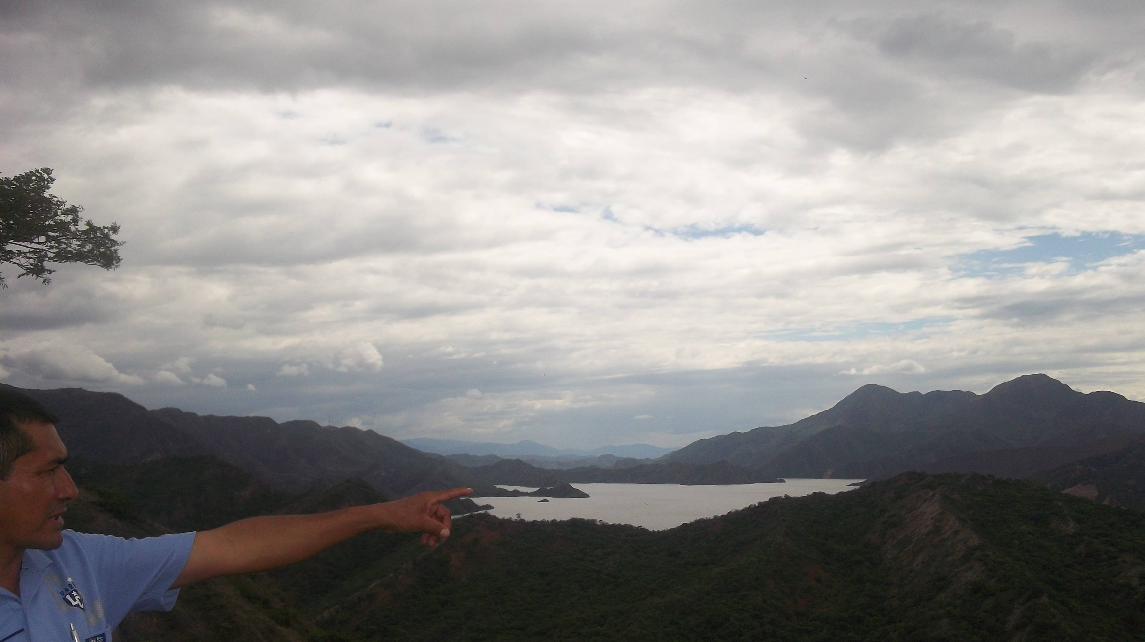 Esta fotografía fue tomada en el municipio colombiano con código 41349.